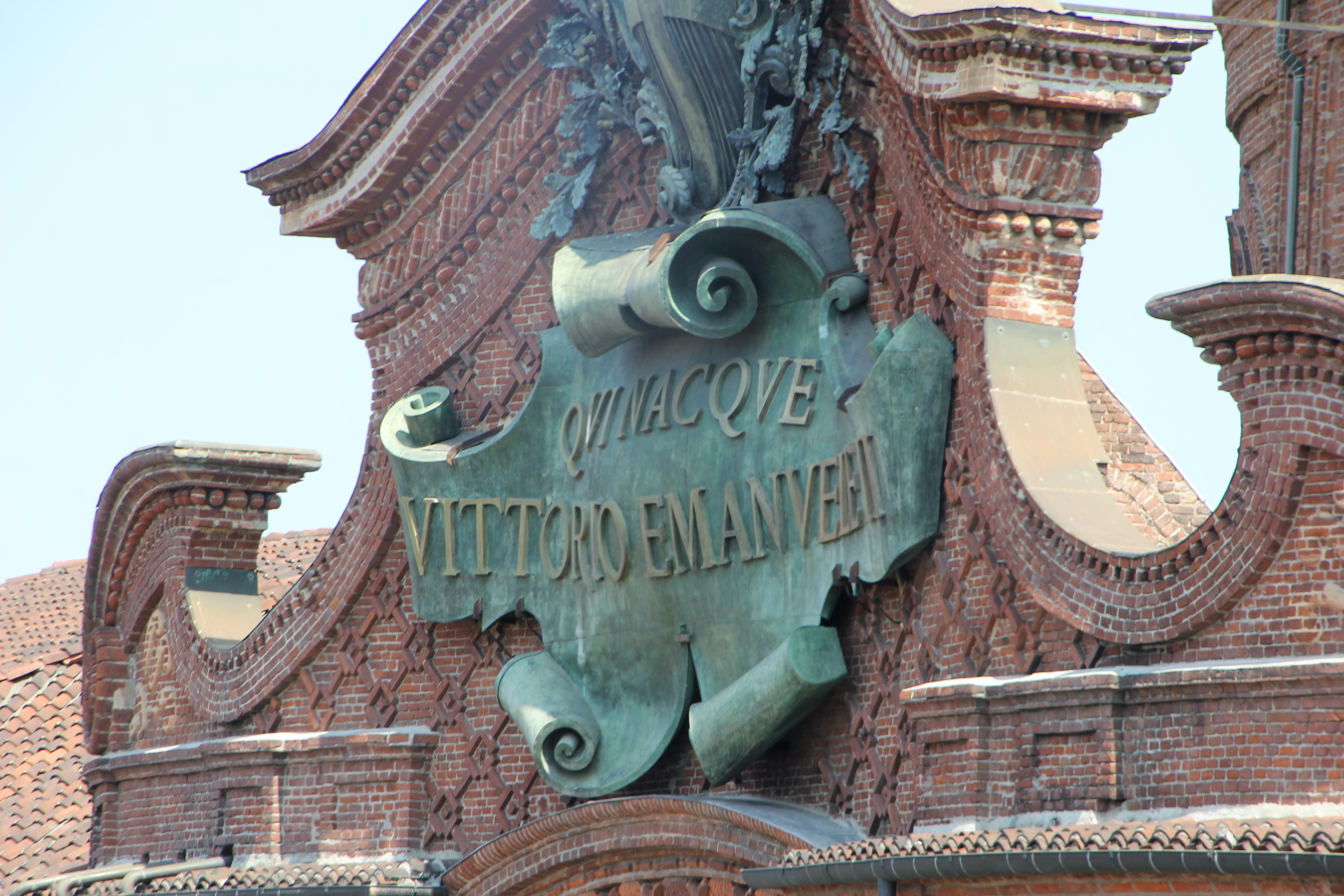 Torino, palazzo Carignano